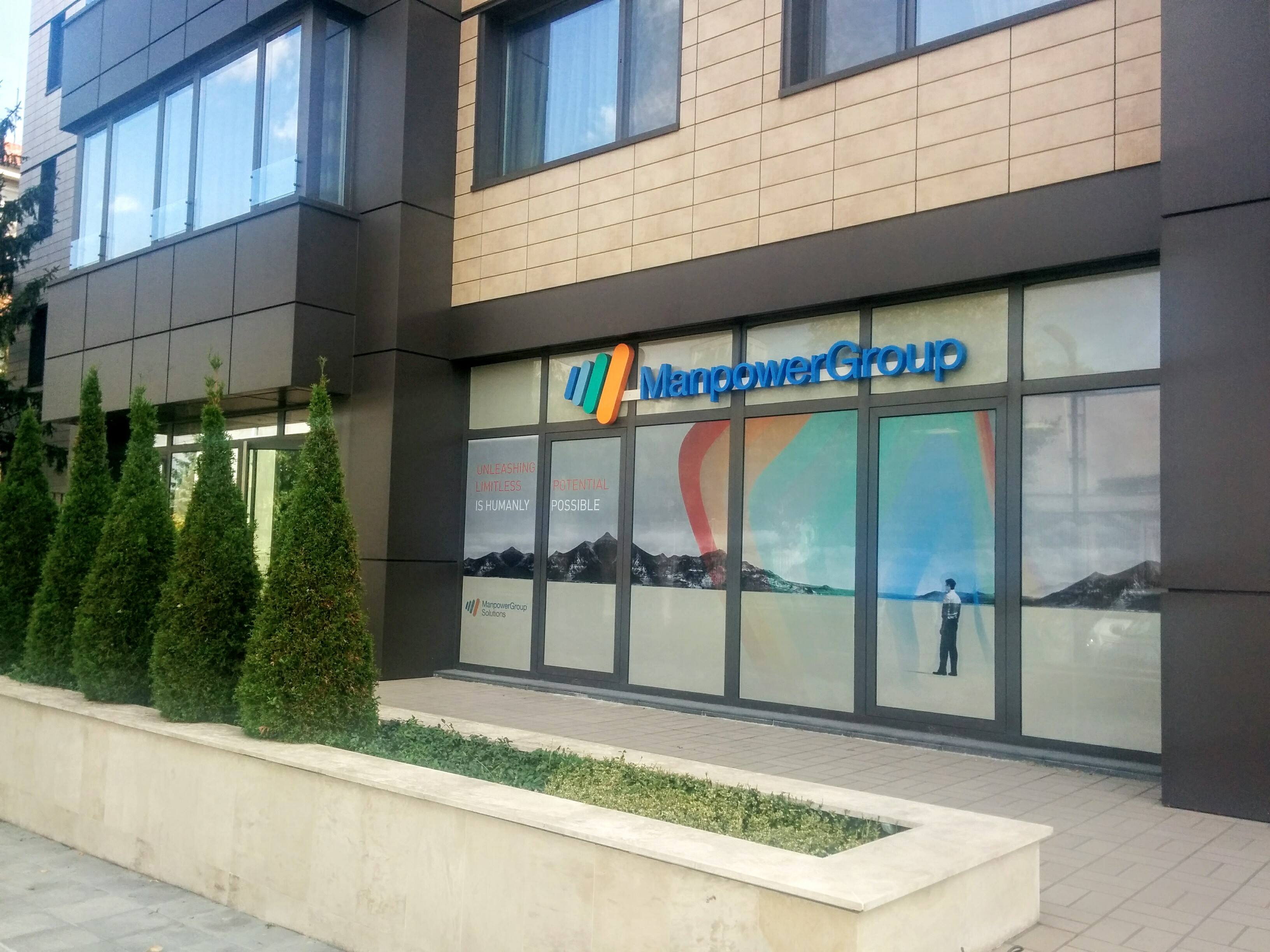 Manpower Group® (Менпауър Груп) е американска мултинационла консултантска компания за човешки ресурси със седалище в Милуоки, Уисконсин, САЩ.